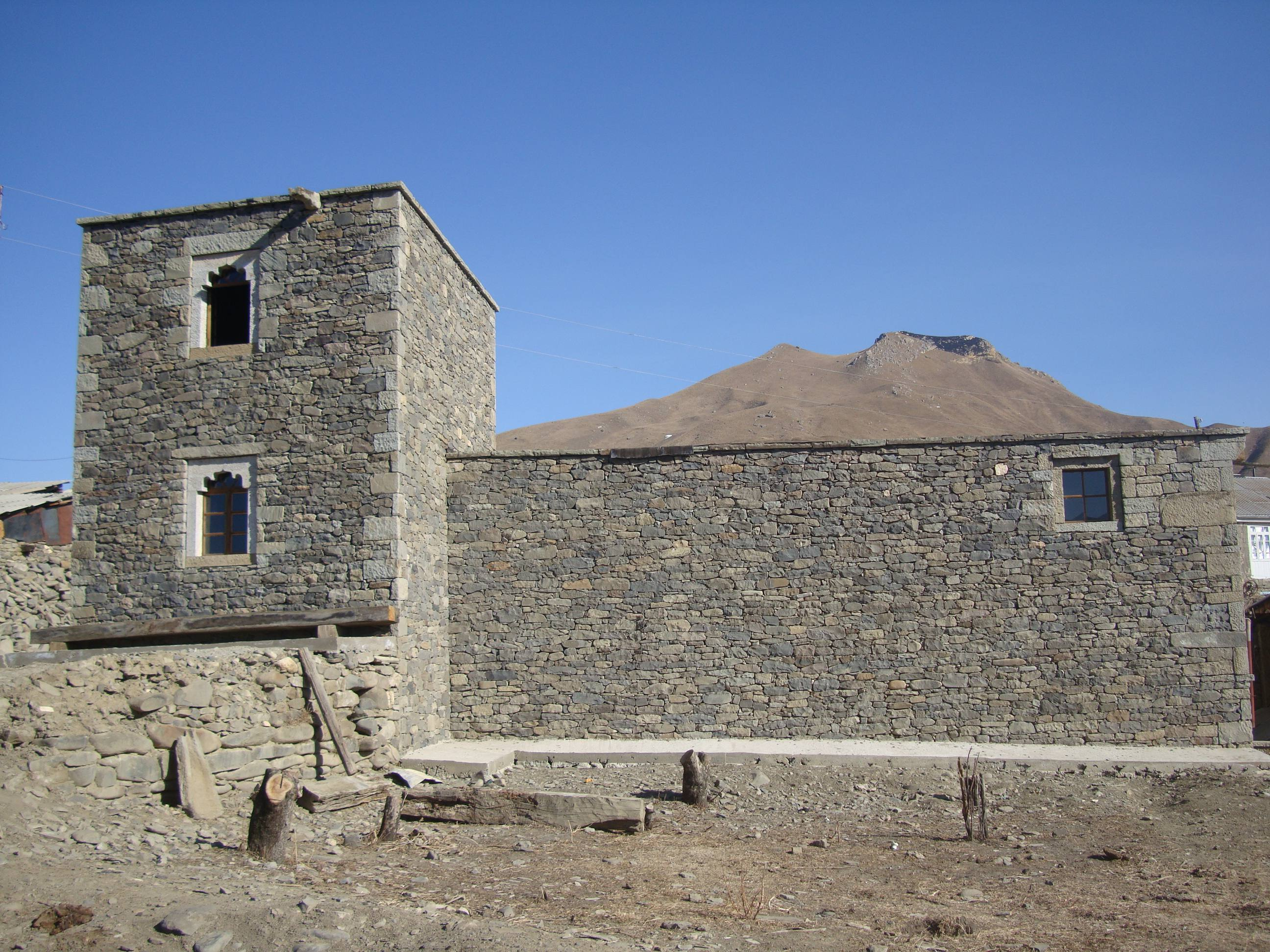 Лакский район, с. Хури